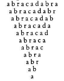 zelfgemaakte JPG